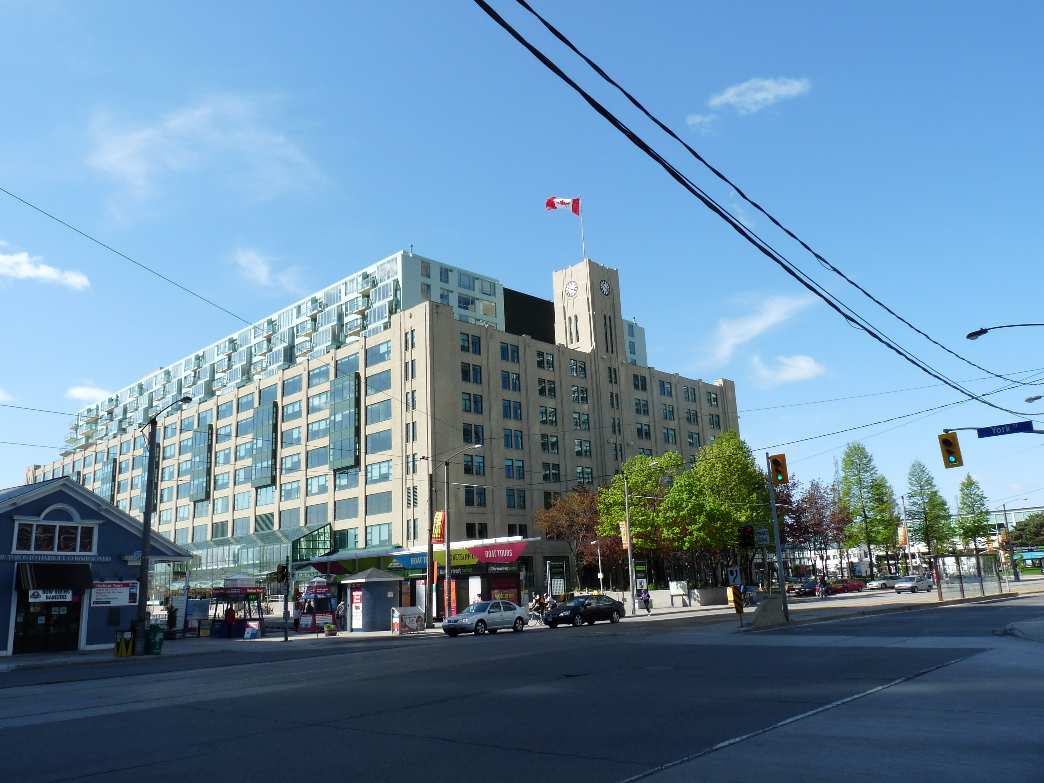 Queen's Quay Terminal, Toronto, Canada